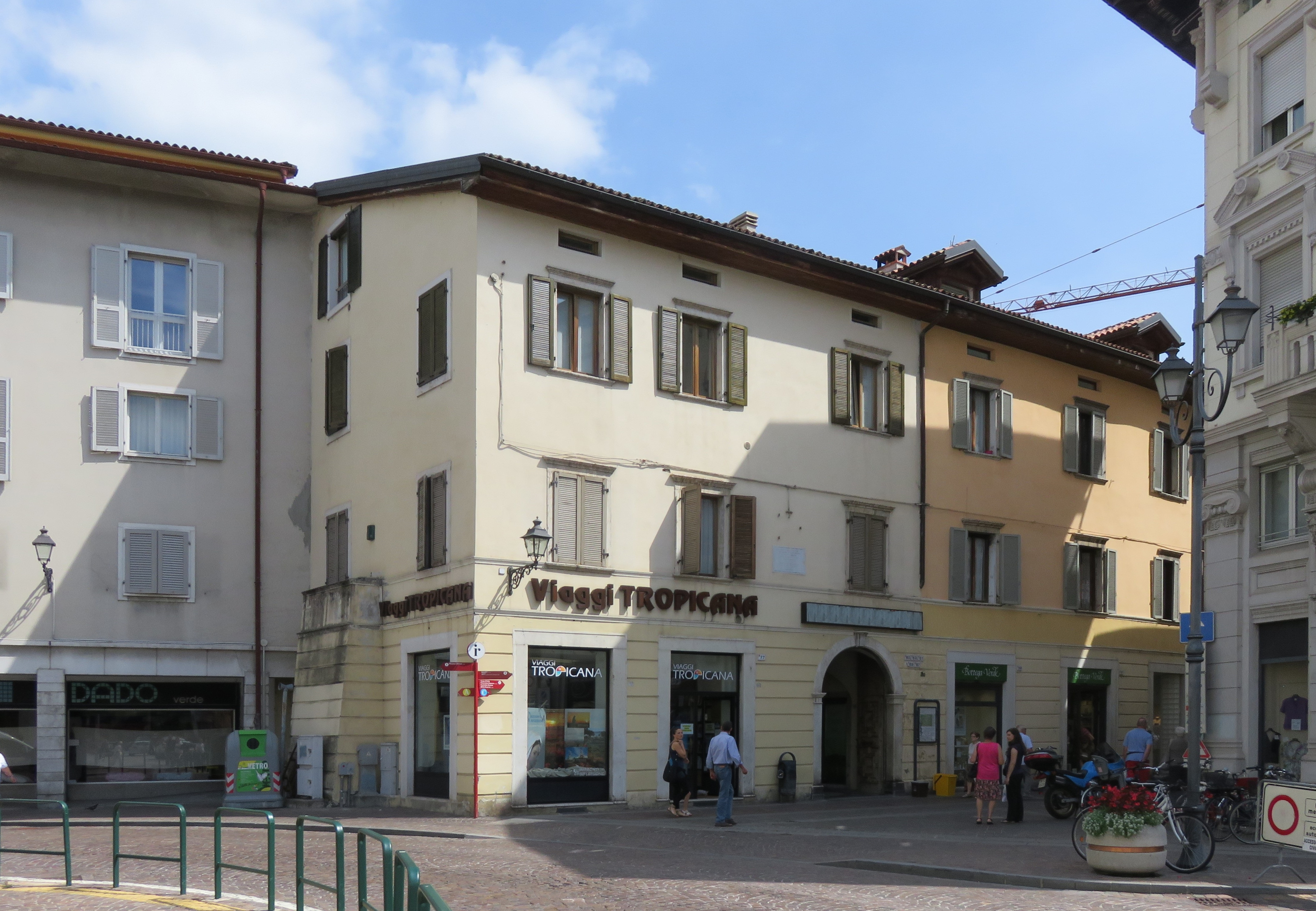 Casa in Via Garibaldi 77 a Rovereto